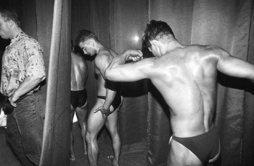 Bodybuilding-Athleten bei der Internationalen Münchner Bodybuildingmeisterschaft 1995 in der Stadthalle Germering (Bayern) am 01.10.1995